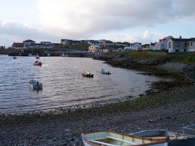 Hamnavoe harbour, West Burra. Shetland